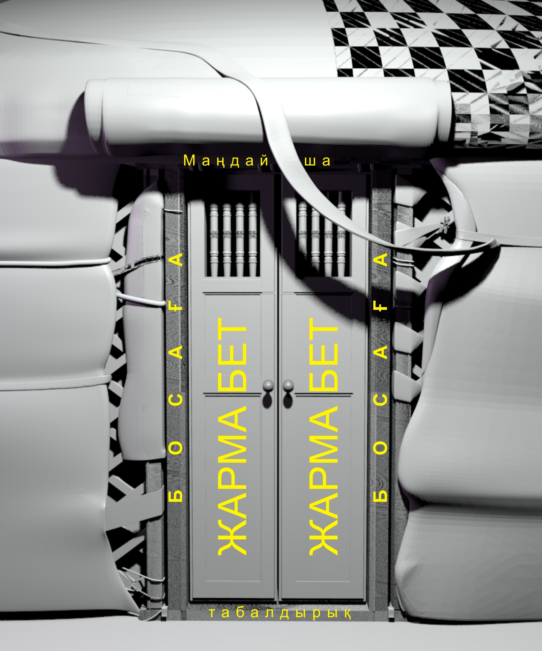 Қазақ үй есігінің құрылысы